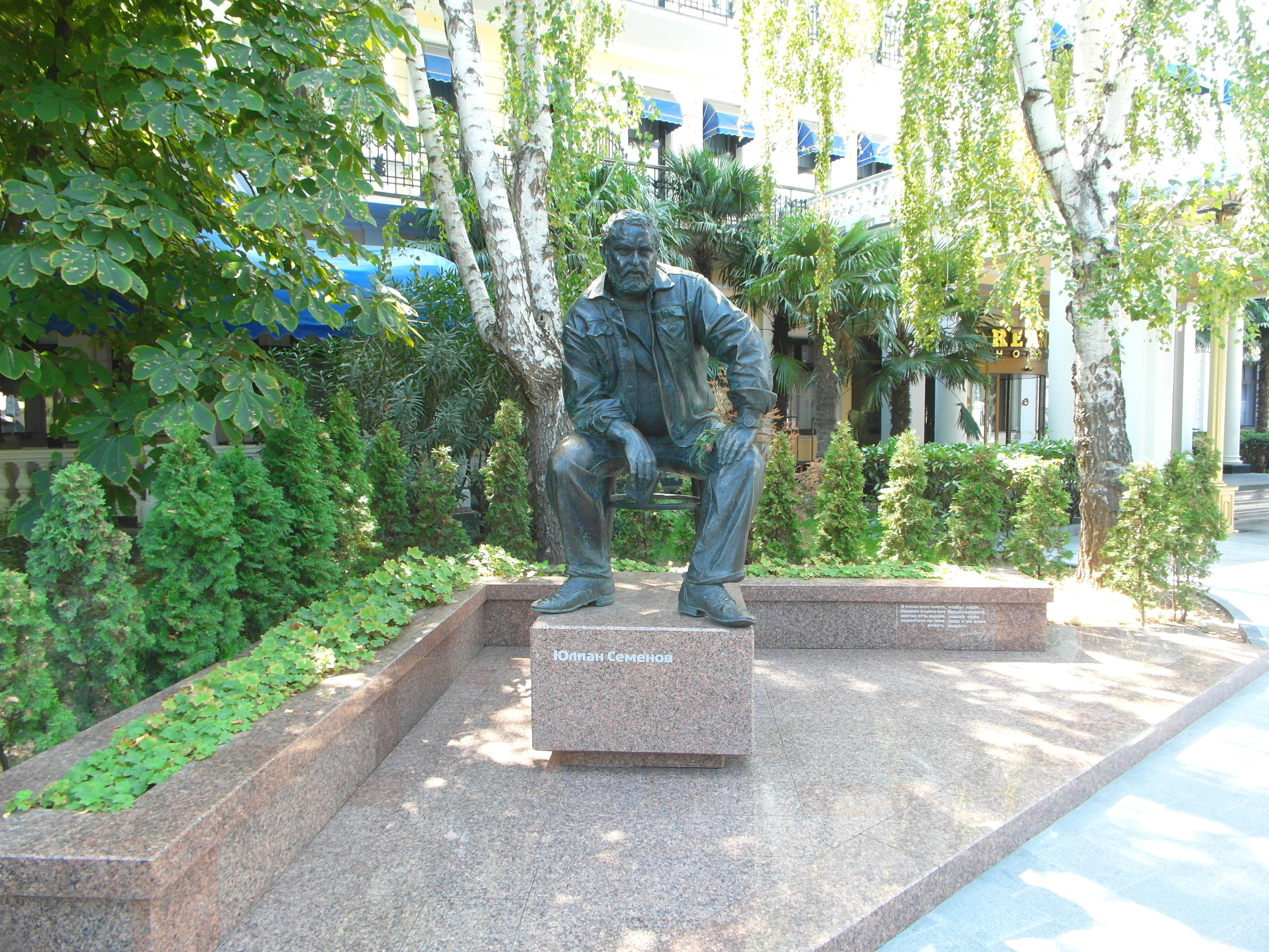 Ялта 2014